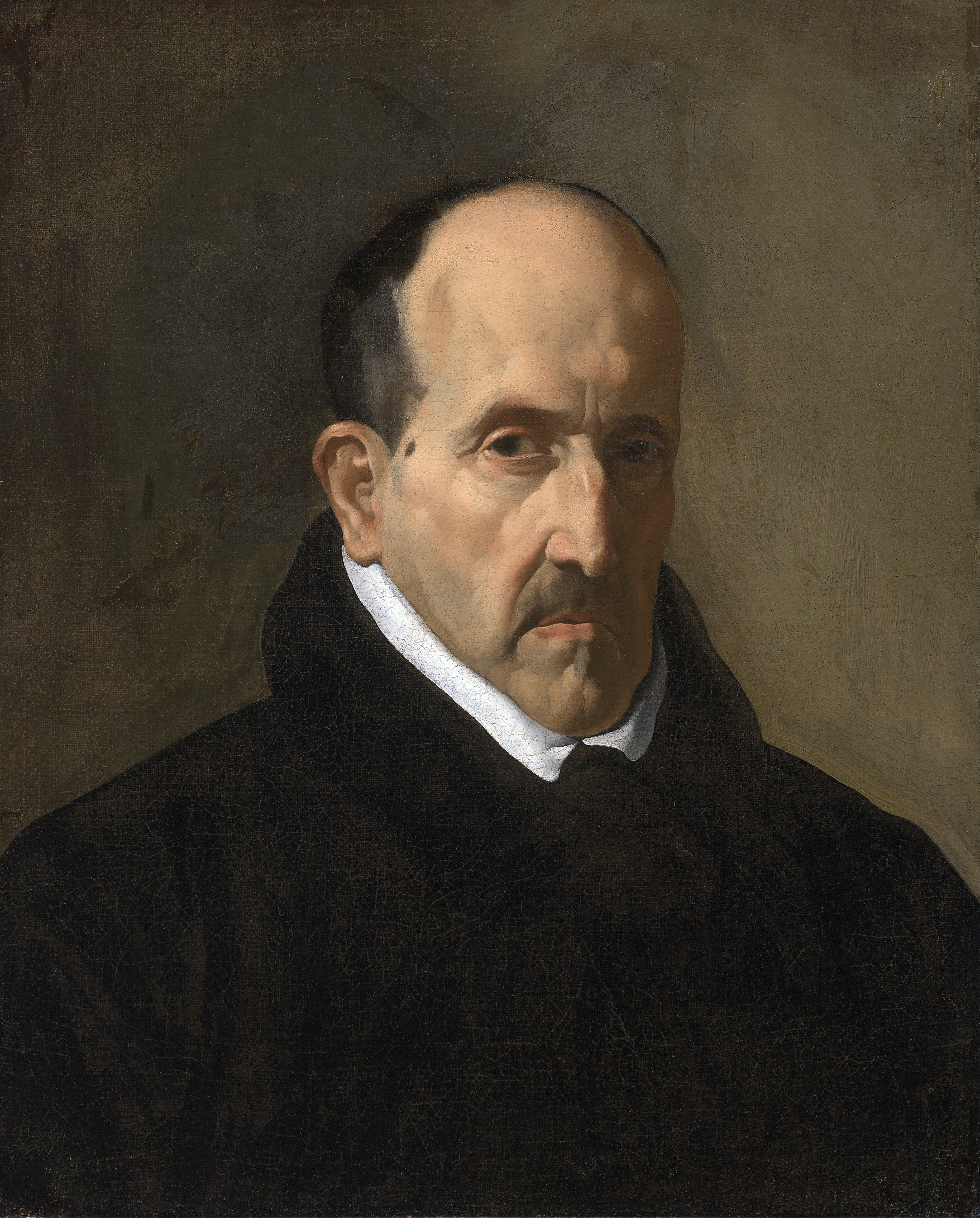 Retrato del poeta y escritor español Luis de Góngora y Argote (1561-1627).